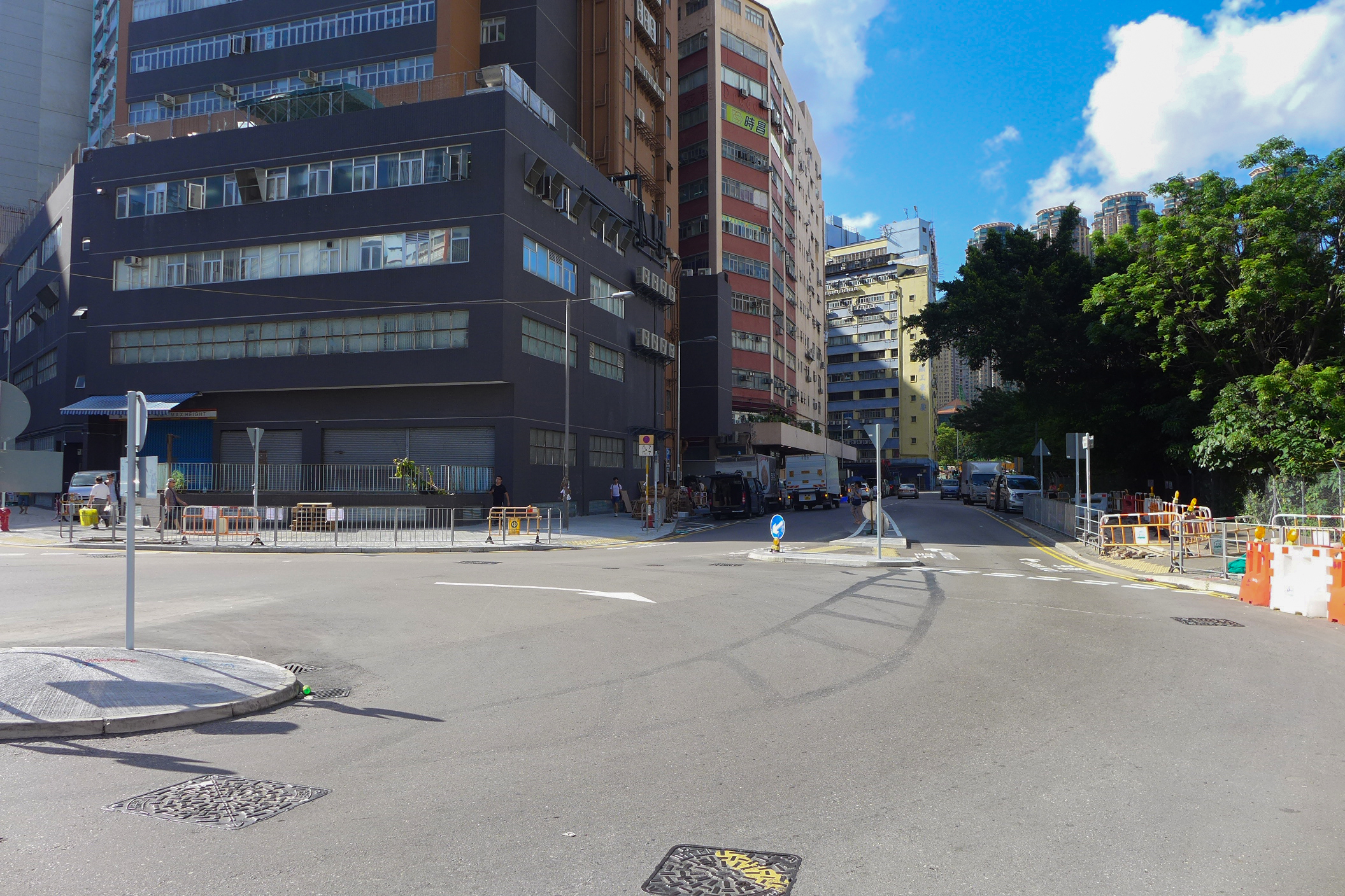 Sze Mei Street, San Po Kong